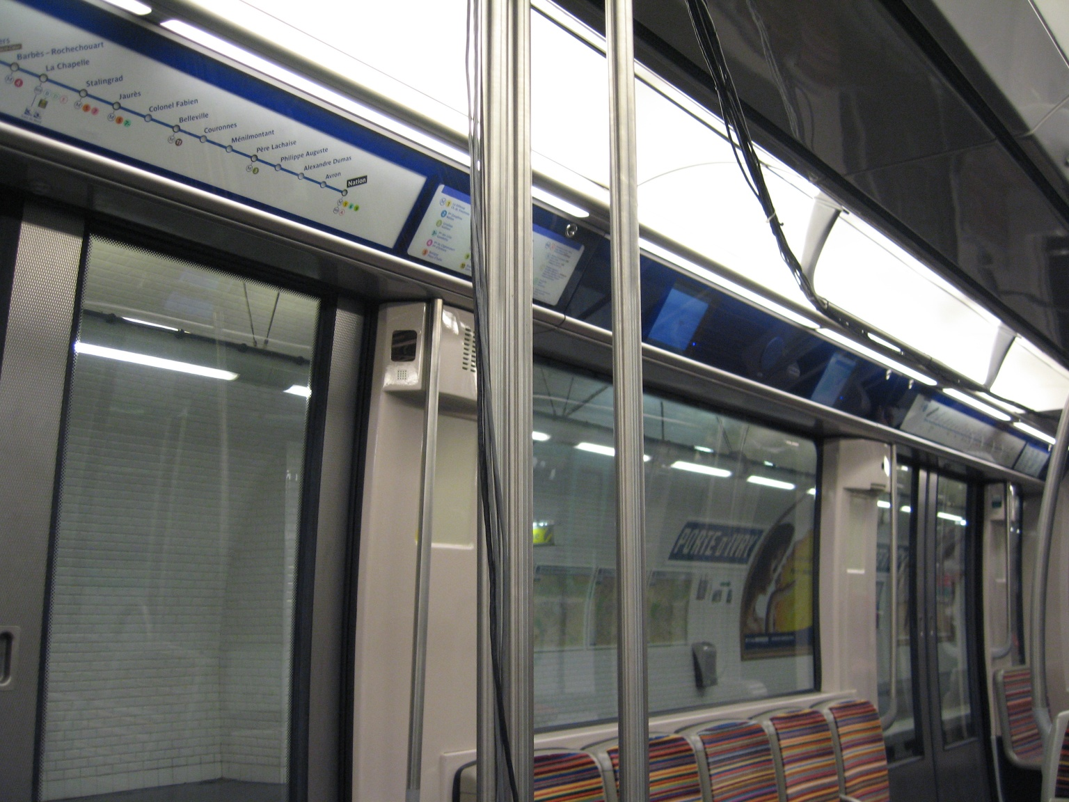 Journées du patrimoine RATP 16-17/09/2006. Systèmes ASVA et Dilidam sur le prototype du MF 2000. Plan clignotant, écrans LCD, caméra de surveillance.